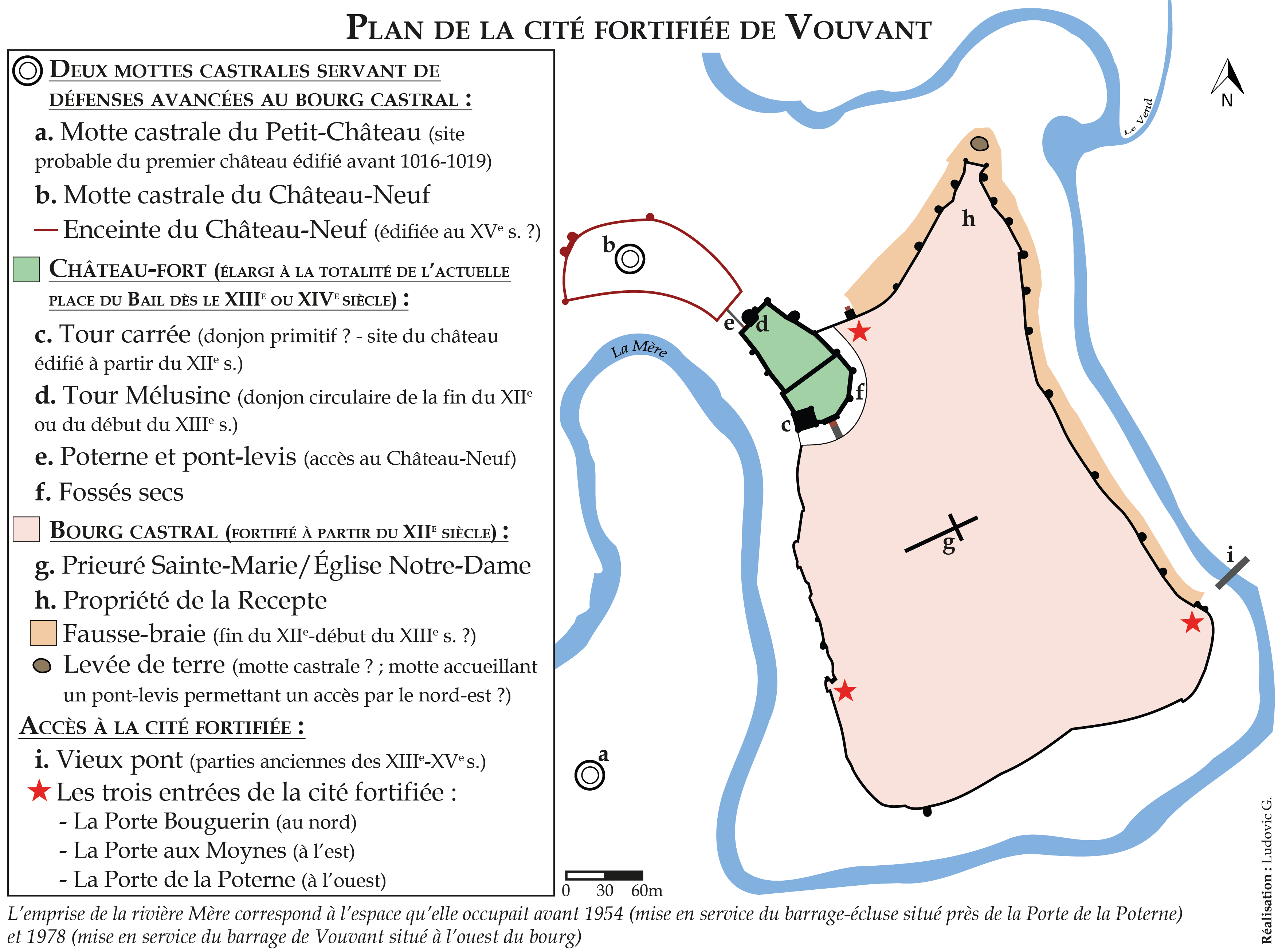 Plan probable de la cité fortifiée de Vouvant, réalisé avec l'appui de recherches historiques.